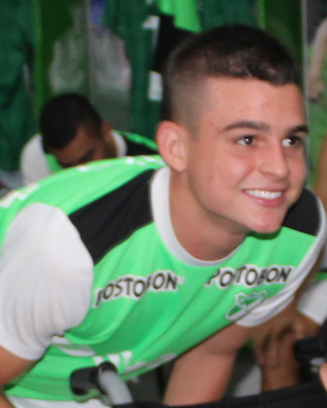 Nicolás Benedetti jugador canterano del Deportivo Cali